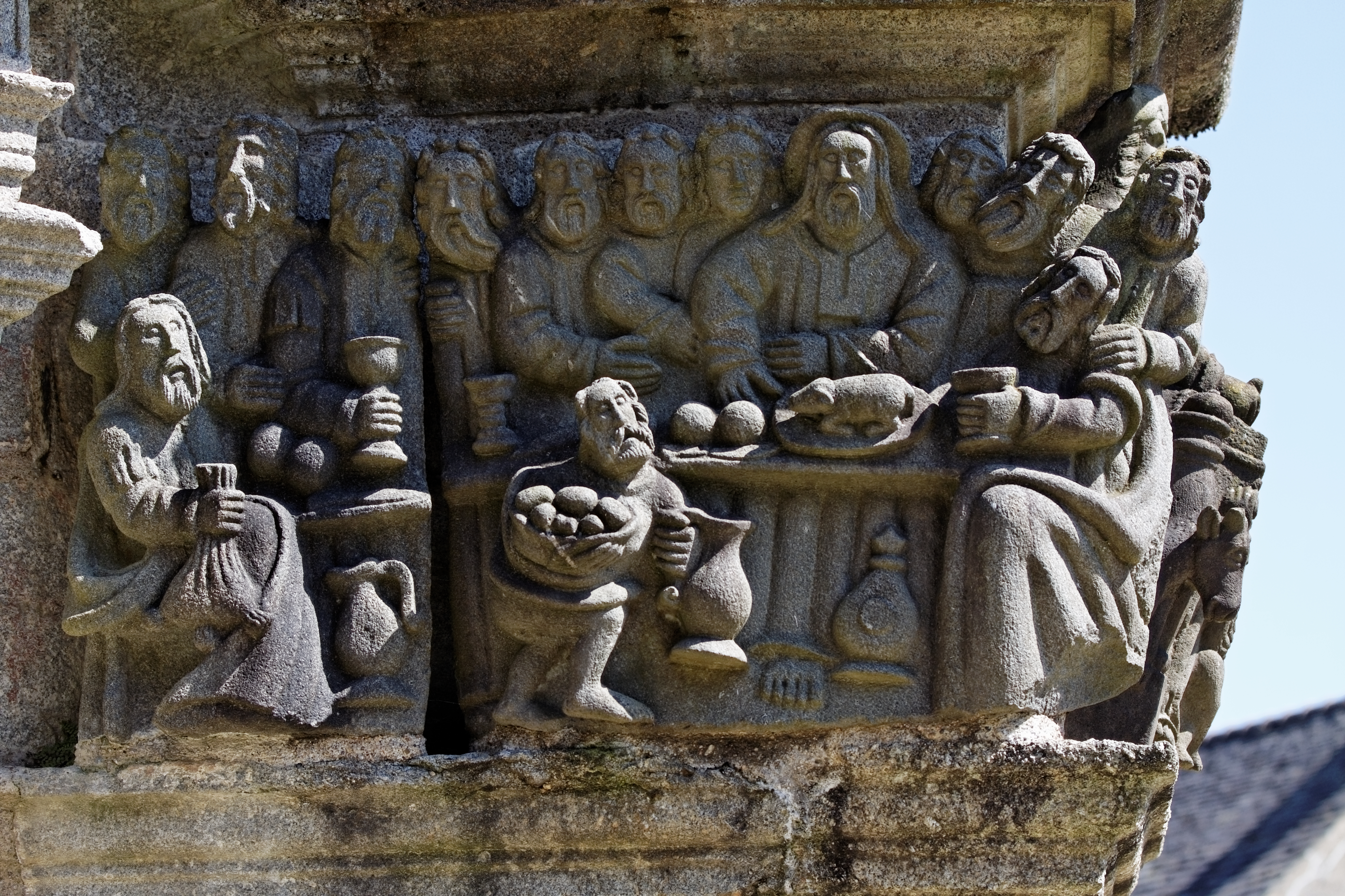 Vue du calvaire de l'enclos paroissial de Guimiliau.